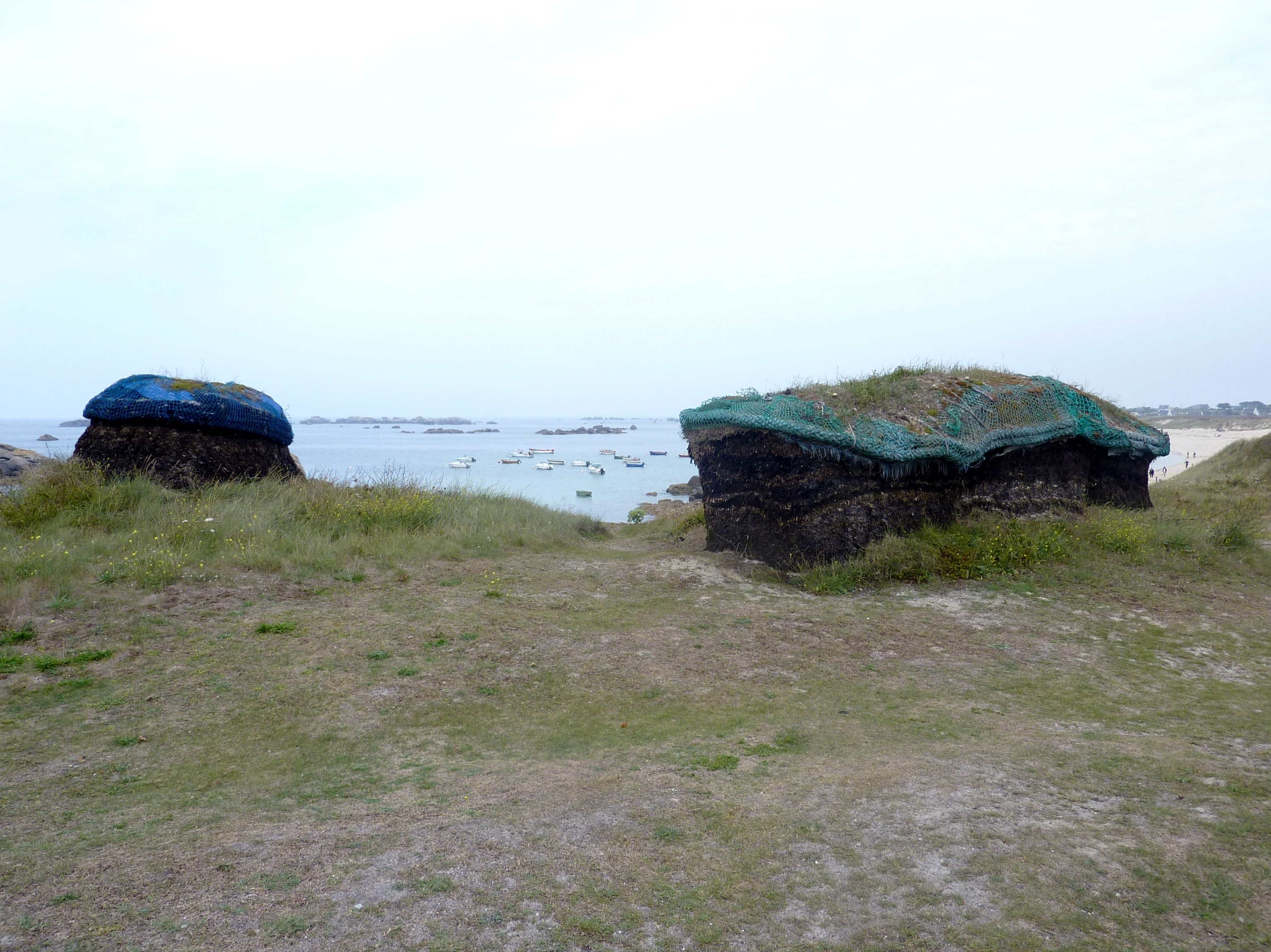 Kerlouan : tas de goémon en train de sécher